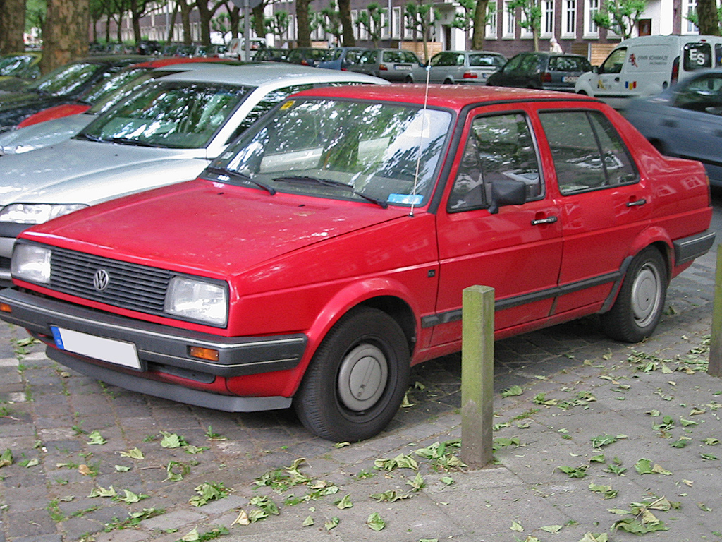 Beschreibung: VW Jetta 2 Quelle: selbst fotografiert Fotograf: Sven Storbeck